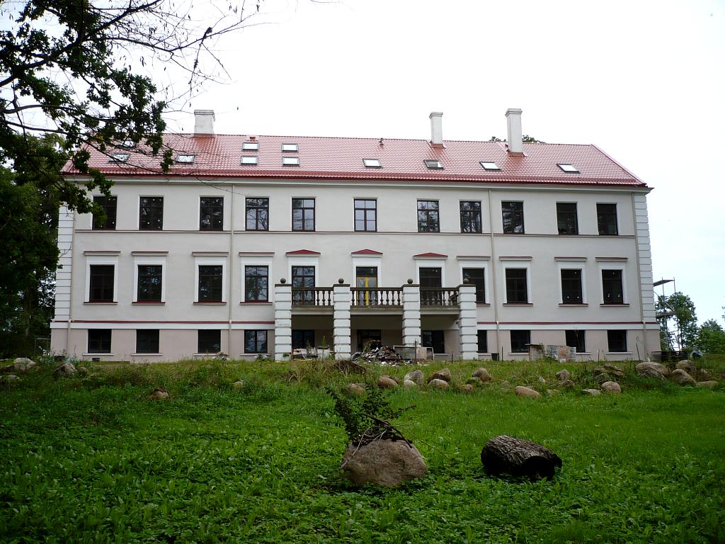 Lielvirbu muižas pils. 2008-09-04